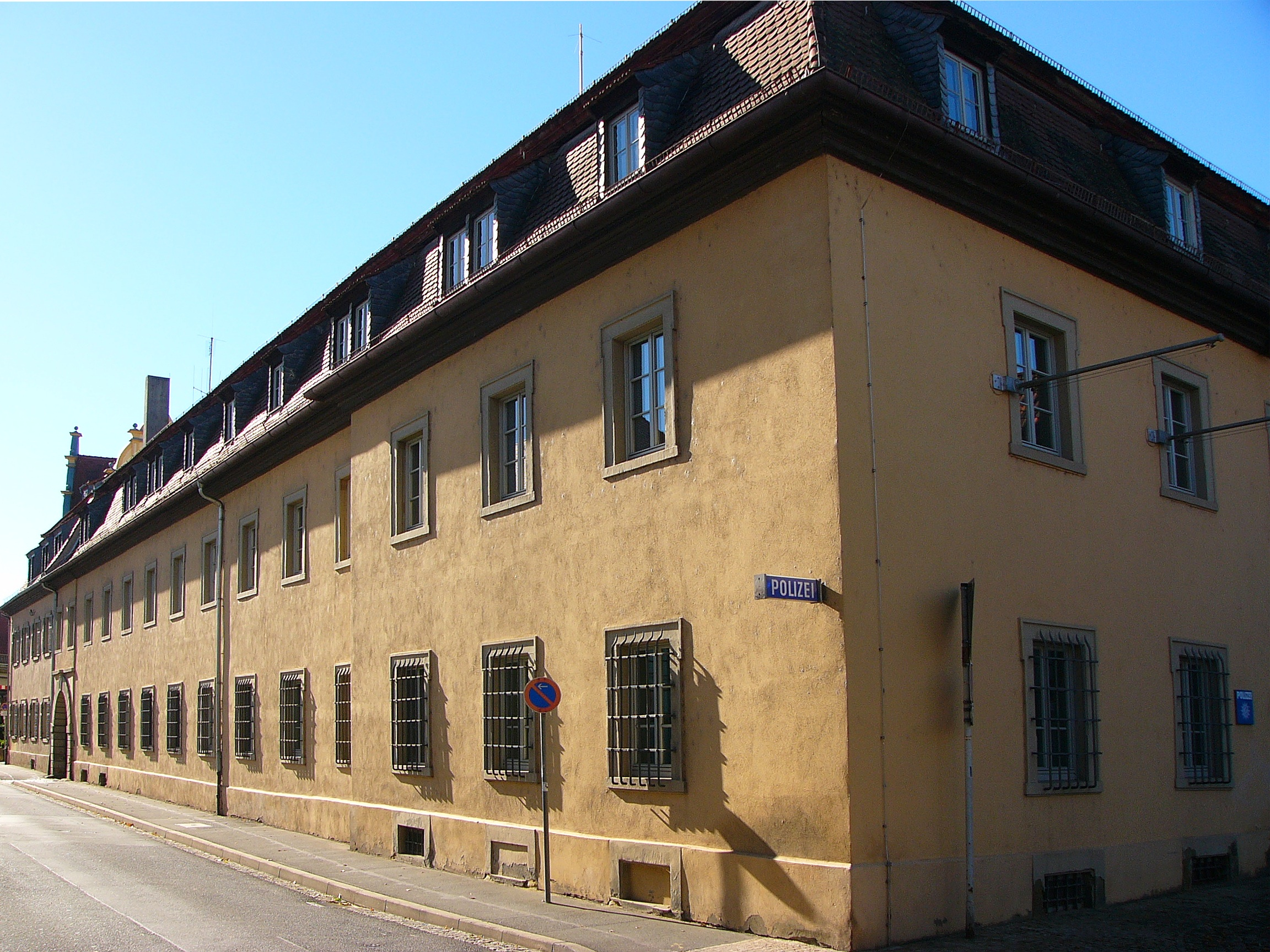 Bayer. Landespolizei; Zweiflügelbau mit Mansarddach und geohrten Fensterrahmungen, 2. Hälfte 18. Jahrhundert.This is a photograph of an architectural monument.